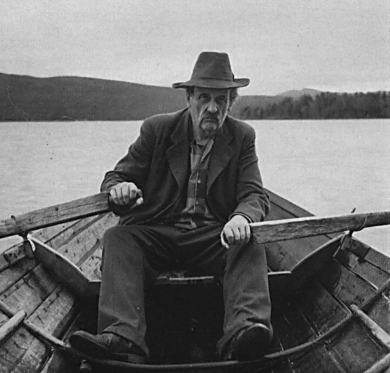 Gustav Hedenvind-Eriksson ror på Hotagssjön, Jämtland